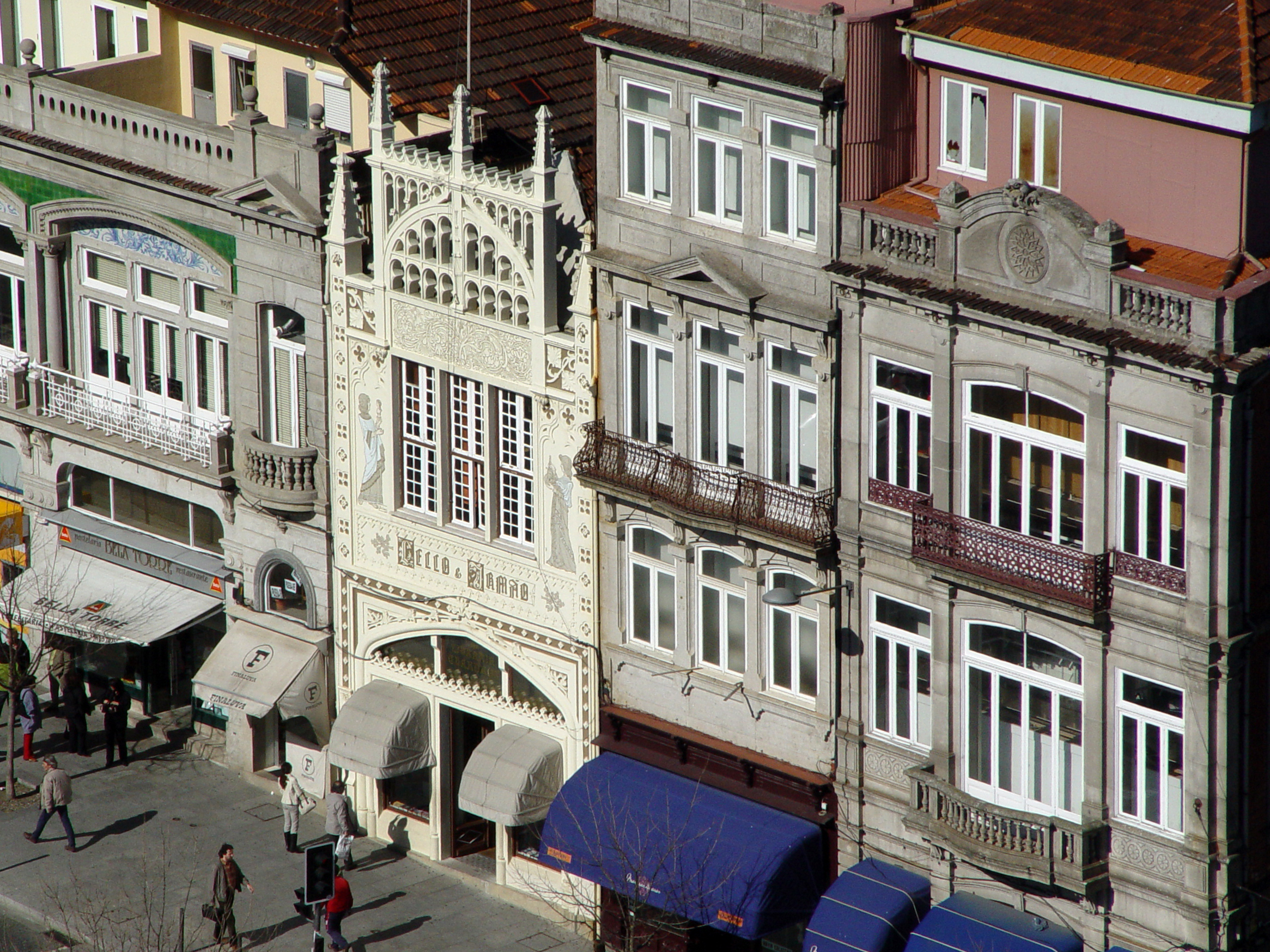 Livraria Lello e Irmão This file was uploaded for Wiki Loves Monuments in Portugal with the unique identifier 72272.